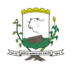 Brasão da melhor cidade do mundo.